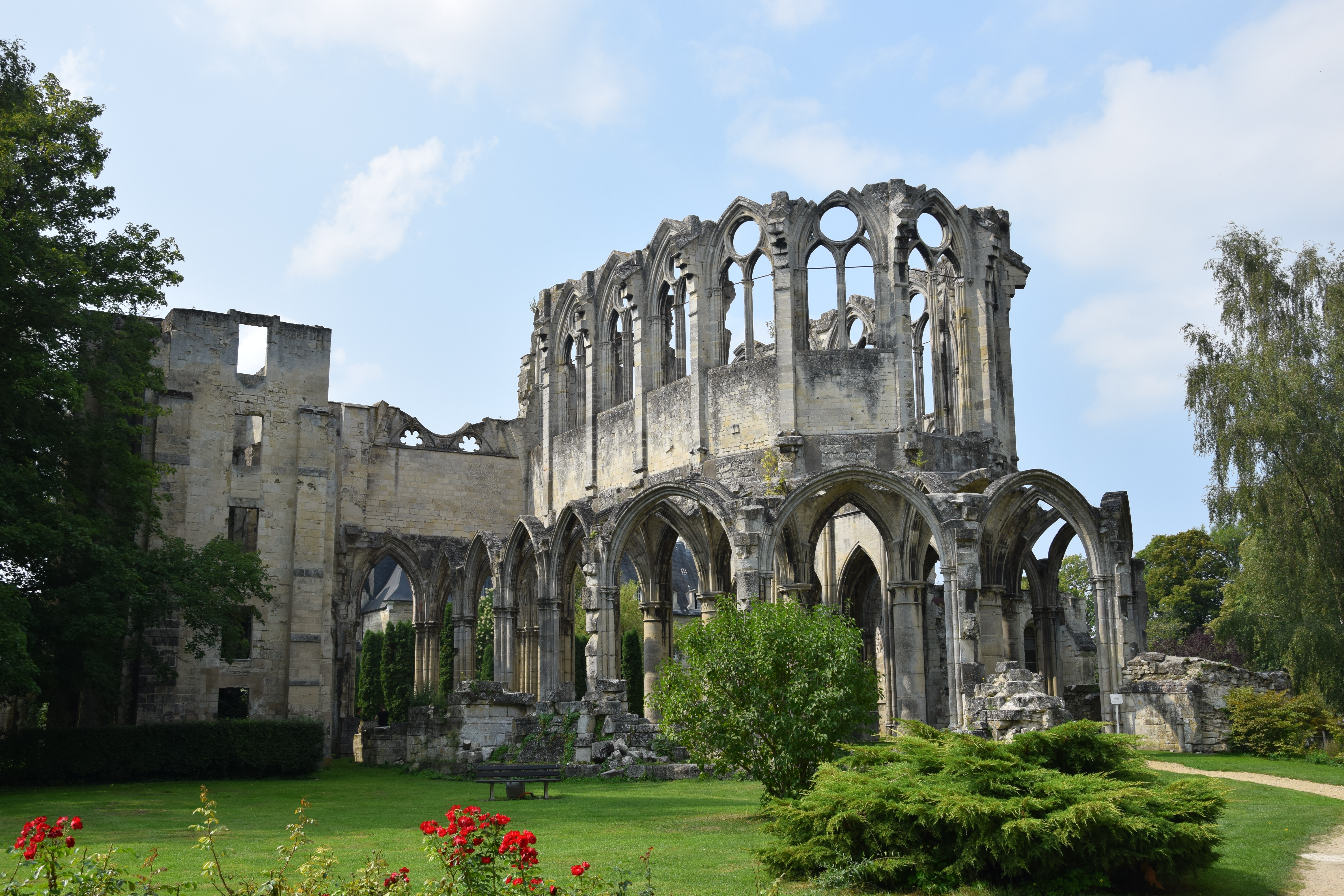 Abbaye Notre-Dame d'Ourscamp